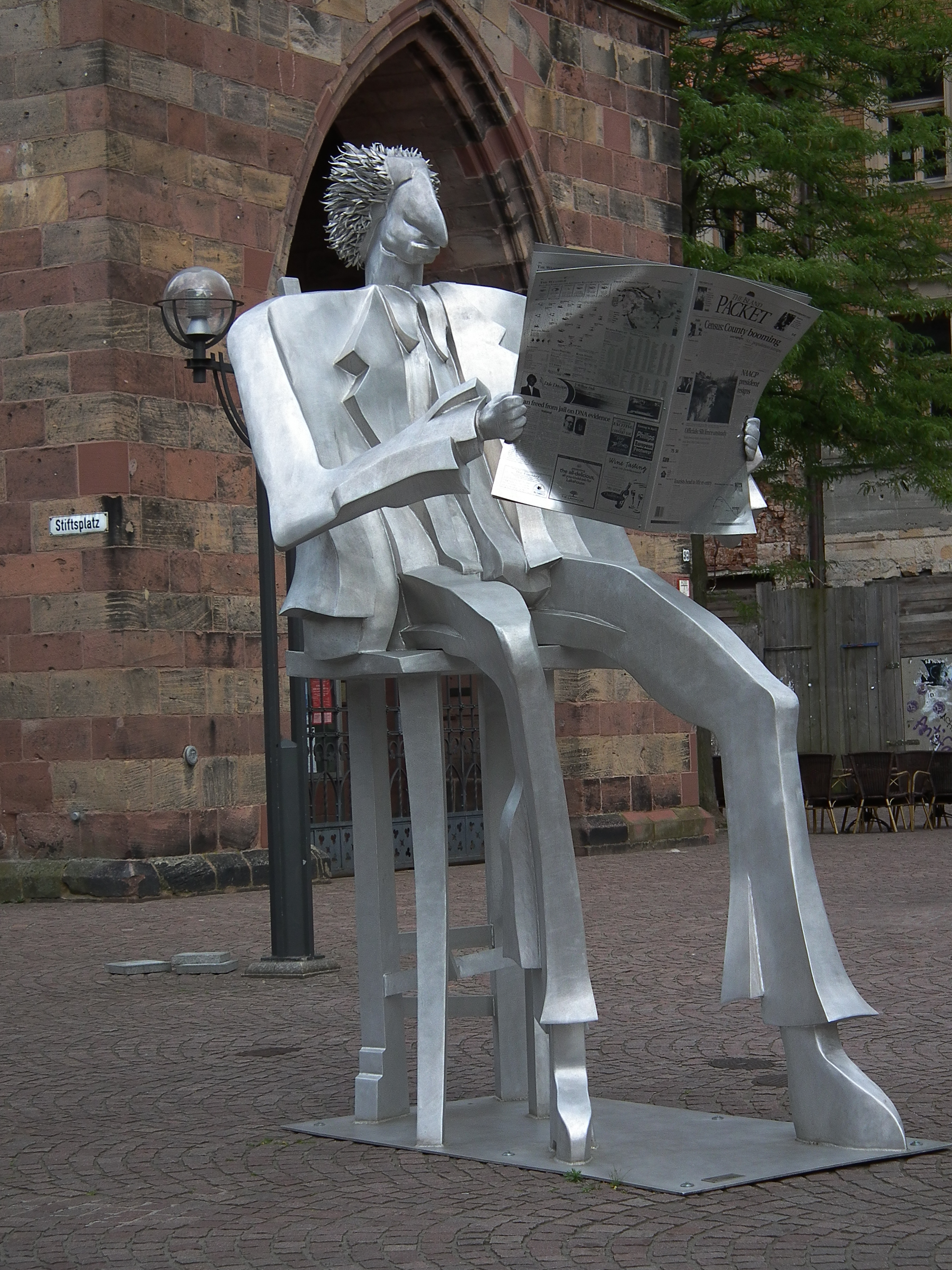 Aluminium-Skulptur "Zeitungsleser" (2001) von Kurt Laurenz Metzler, fotografiert in Landau (Rheinland-Pfalz, Deutschland)